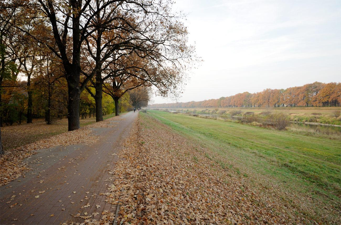 Ulica Kanałowa idąca wzdłuż kanału przeciwpowodziowego - urocze miejsce.